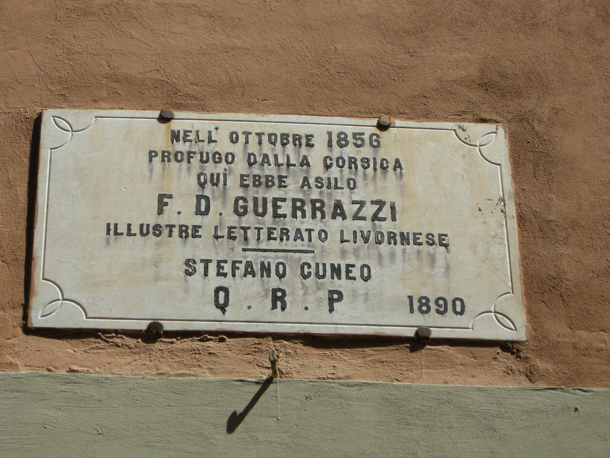 Capraia, paese 07 targa f. d. guerrazzi